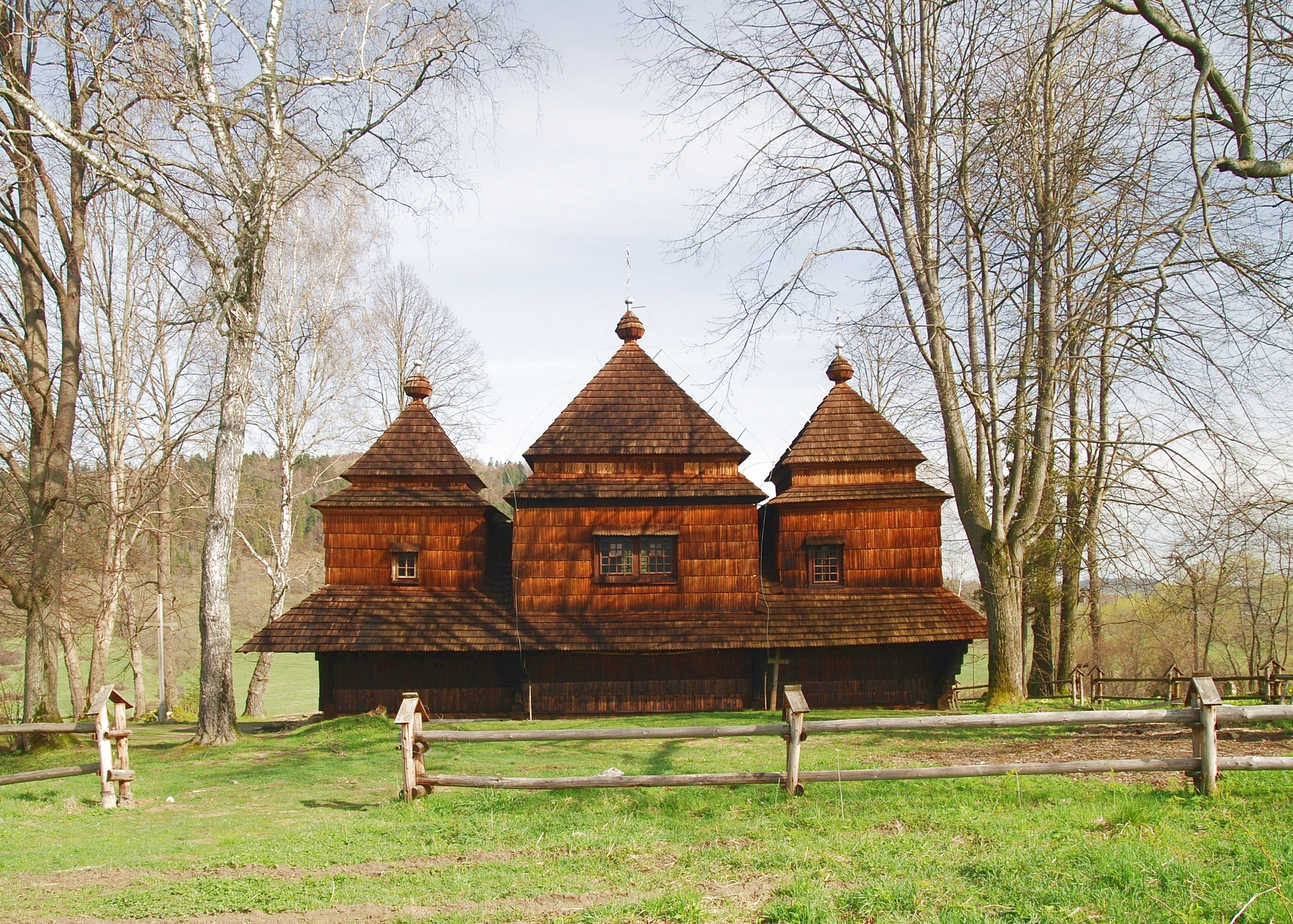 wieś Smolnik (powiat bieszczadzki)